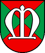 Wappen von Martherenges Kanton Waadt Schweiz